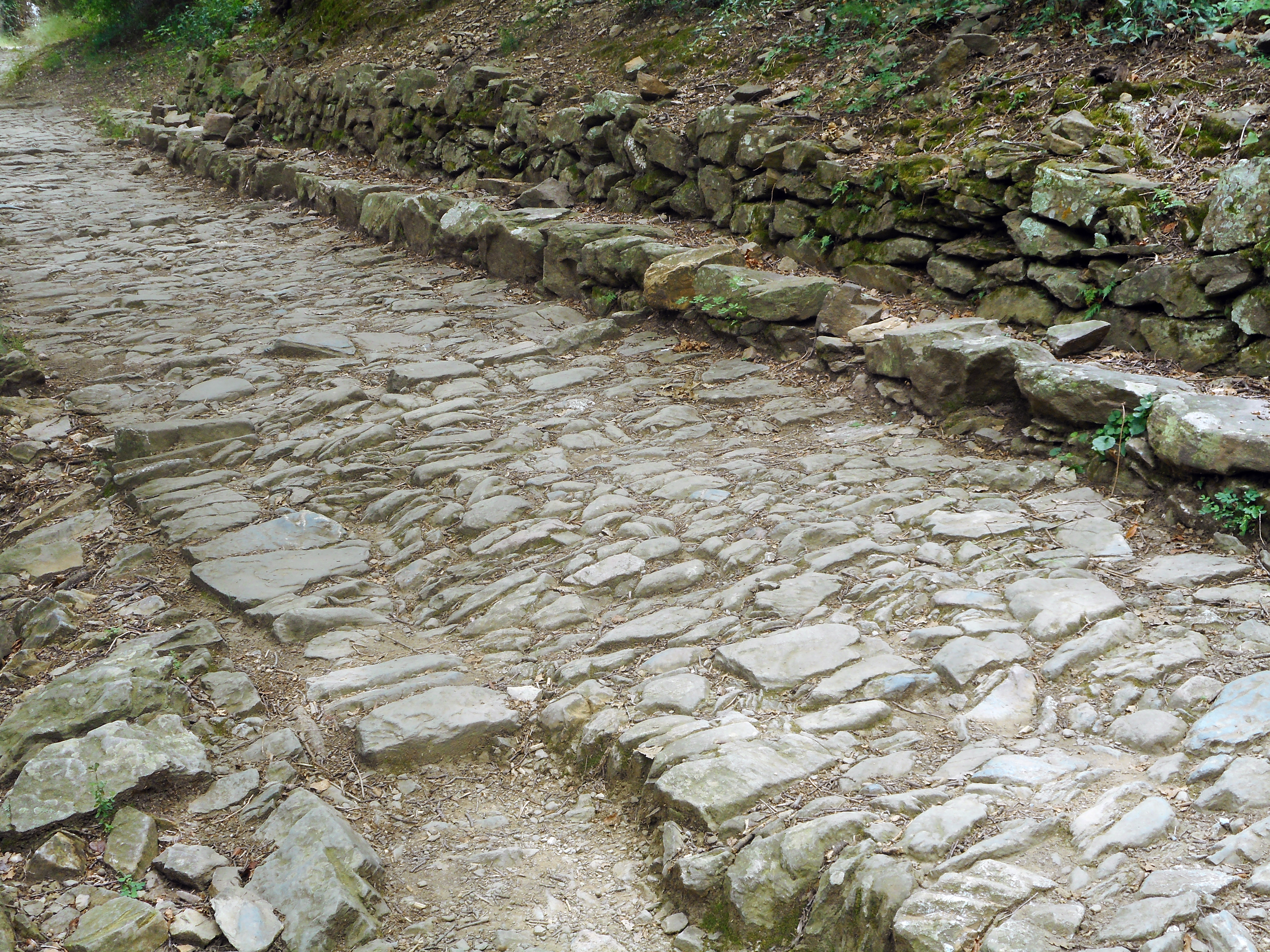 Italien - Via Iulia Augusta - zwischen Albenga (Albingaunum) und Alassio. Im Bild das besterhaltendste, teilrekonstruierte Straßenstück.